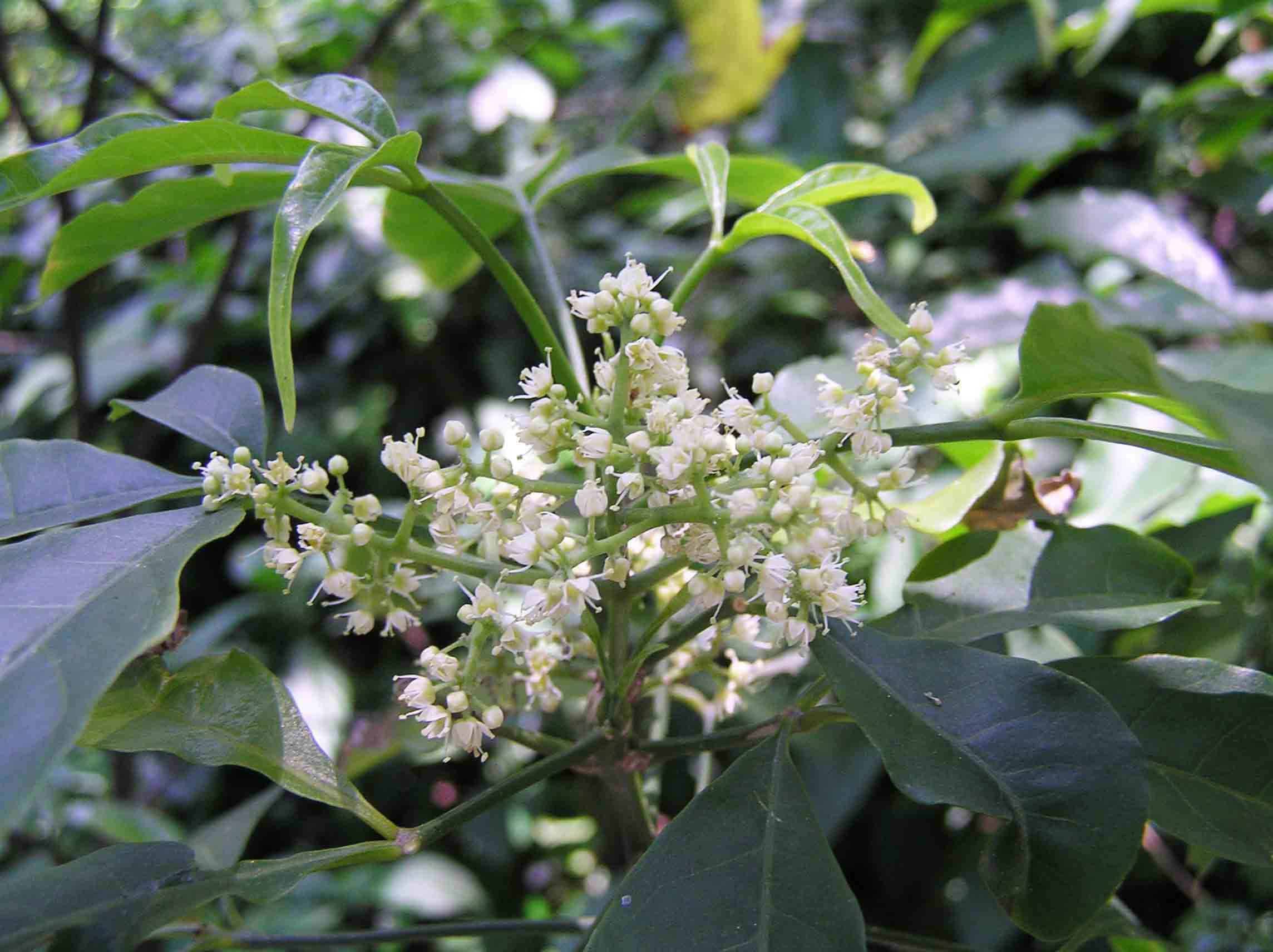 三椏苦(蜜茱萸) Melicope pteleifolia (Evodia lepta) [香港動植物公園 Hong Kong Botanical Garden]